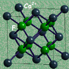 Fluoritaren egitura